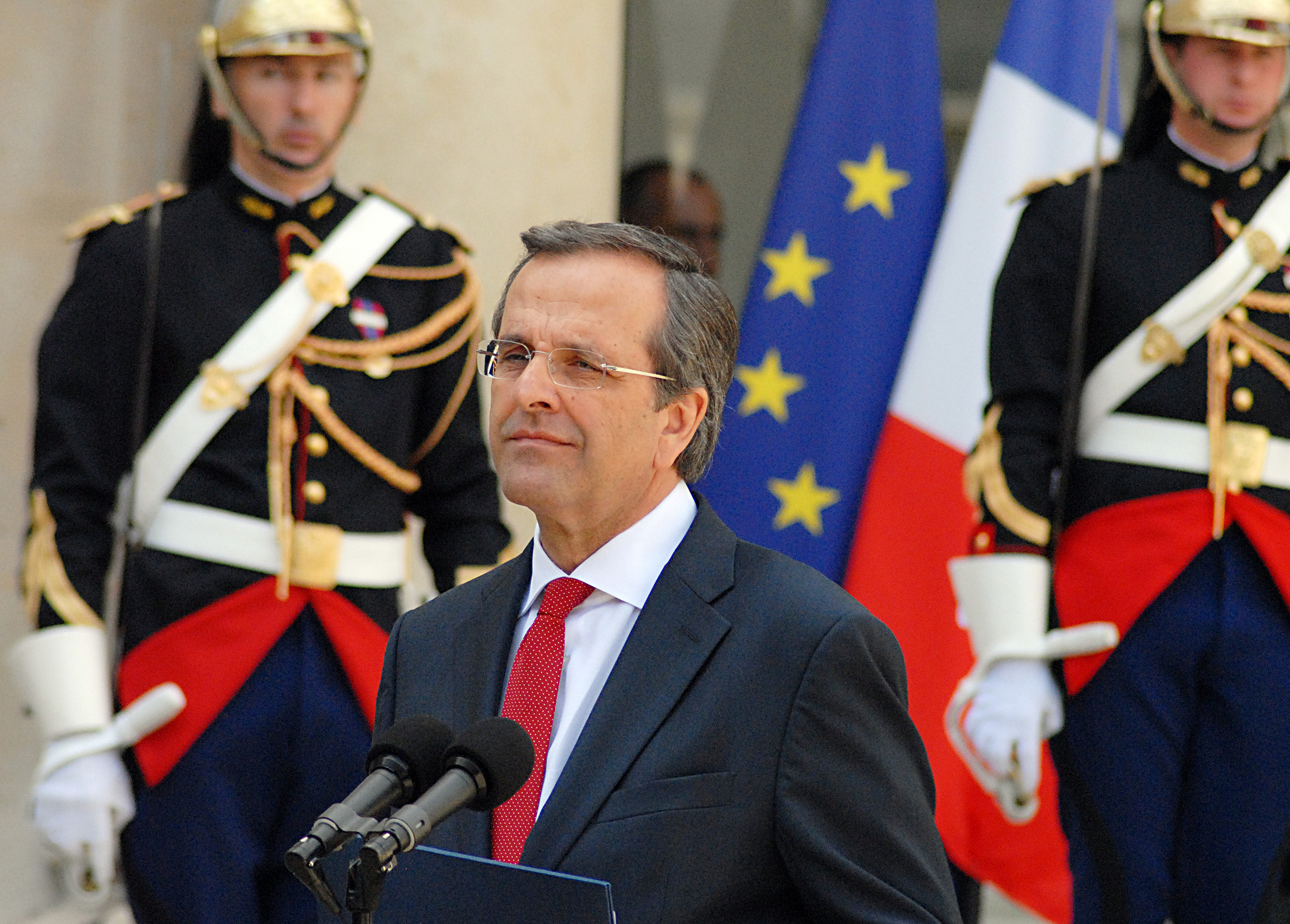 Francois Hollande - Αντώνης Σαμαράς